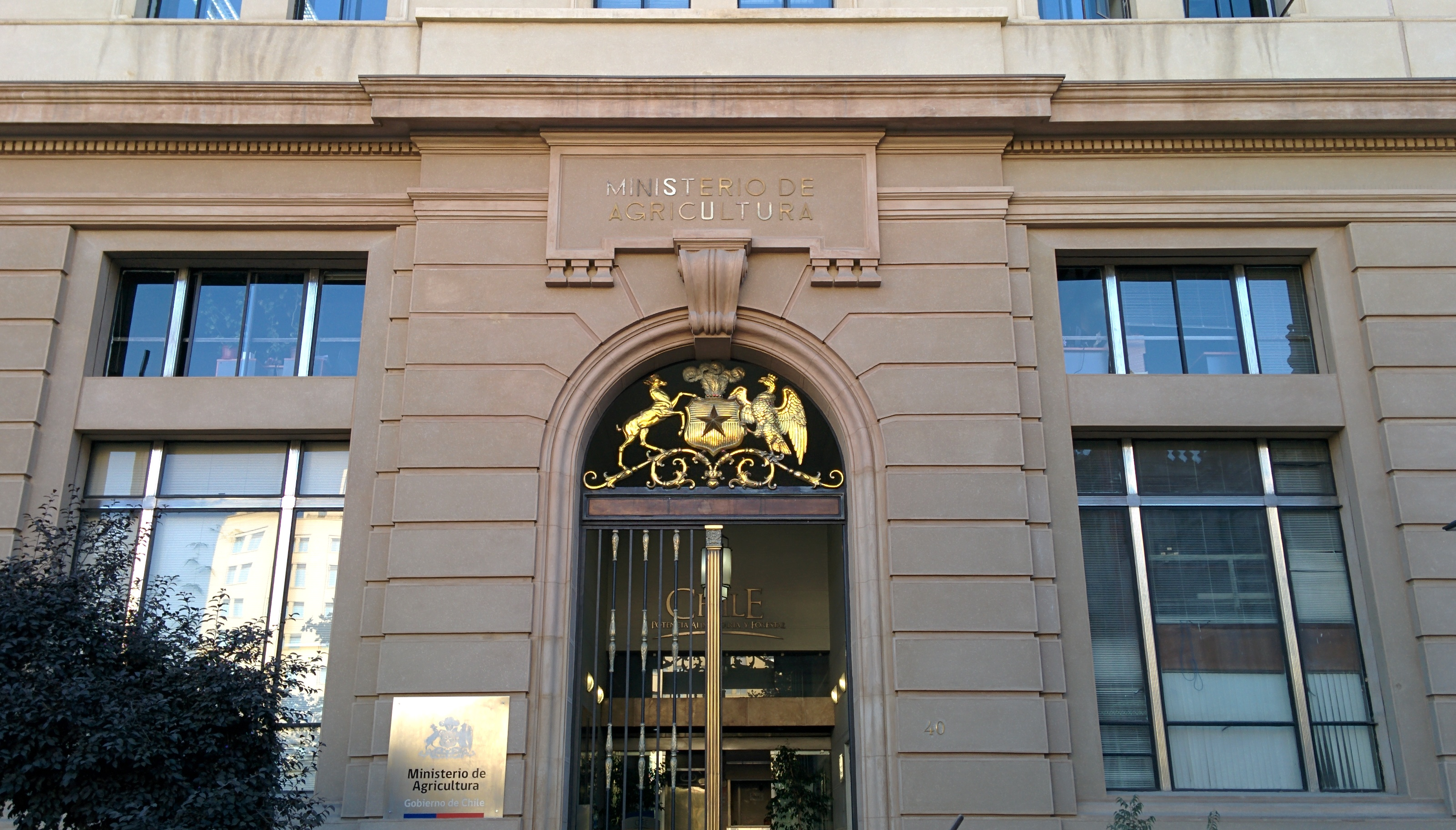 Ministerio de Agricultura, Santiago